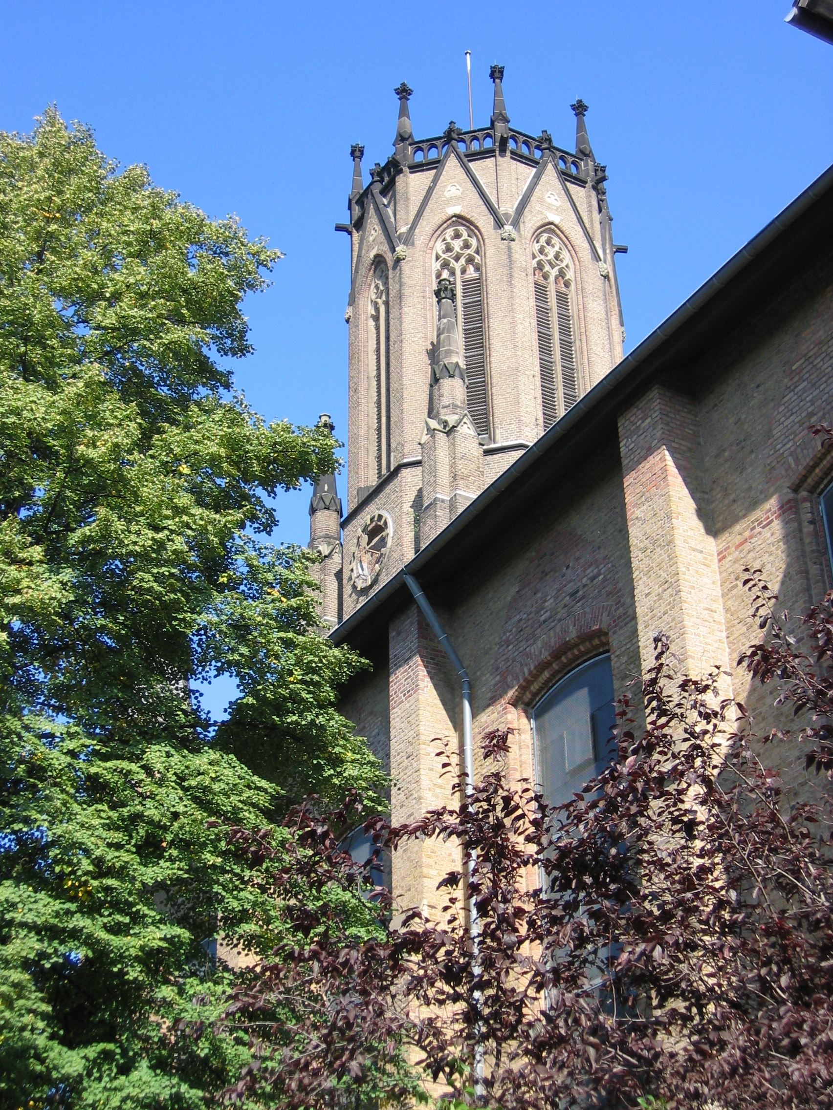 Kath. Herz-Jesu-Kirche in Köln-Mülheim